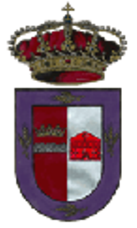 Escudo de Aldea Real, provincia de Segovia (España)